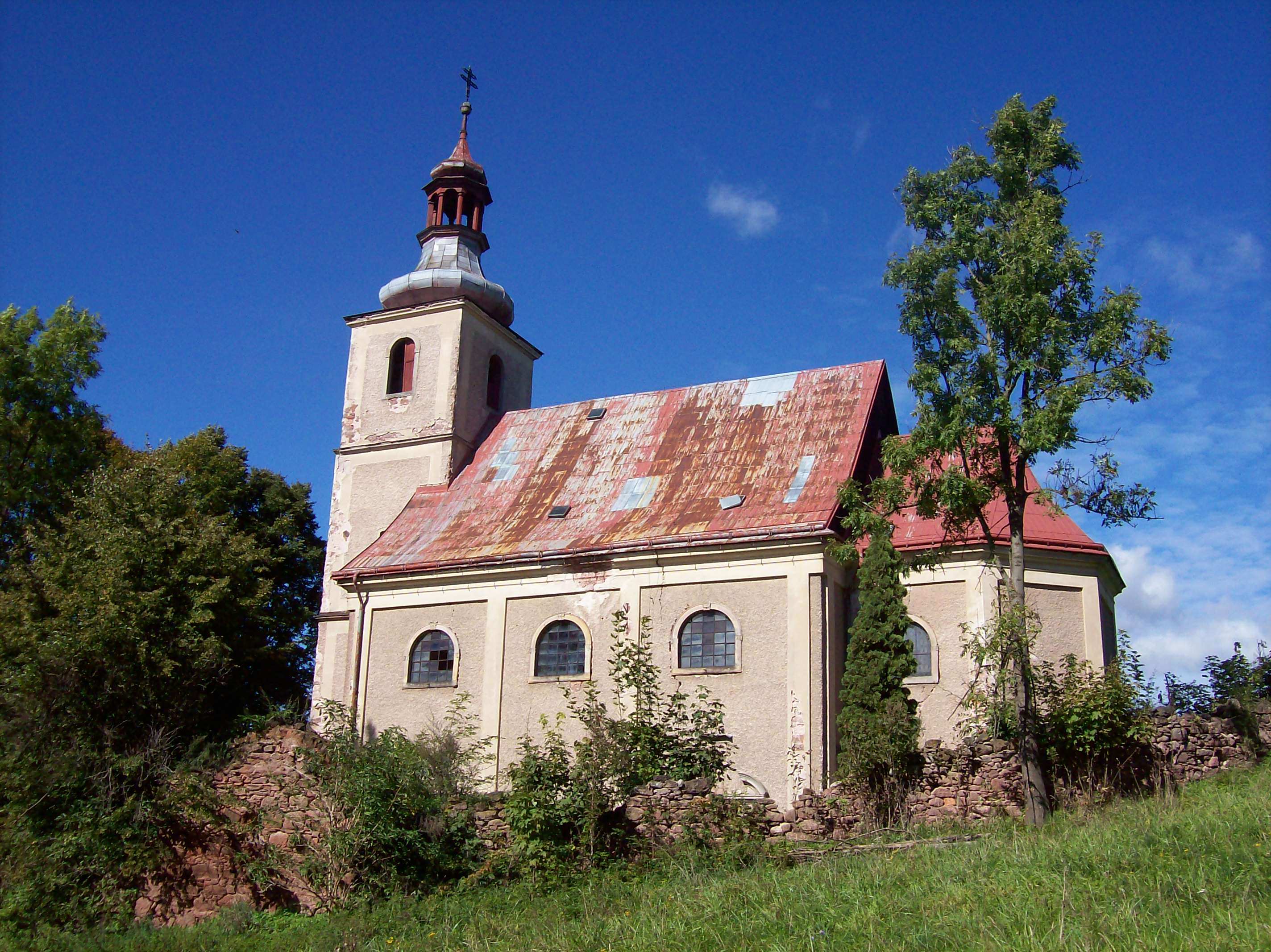 Kostel sv. Martina (Javorník), Javorník